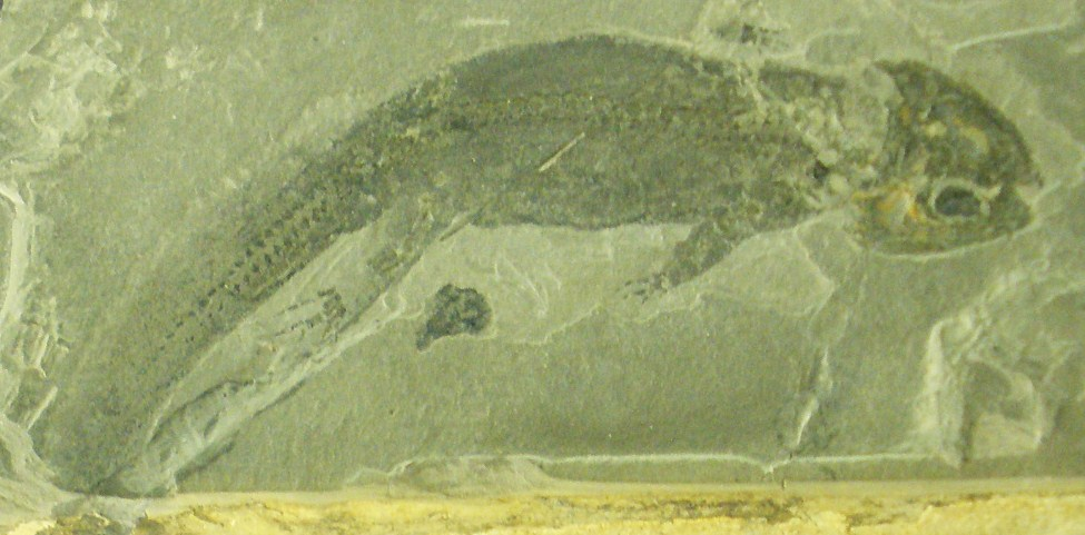 Fossil of Micromelerpeton, an extinct amphibian- Took the photo at Senckenberg Museum of Frankfurt